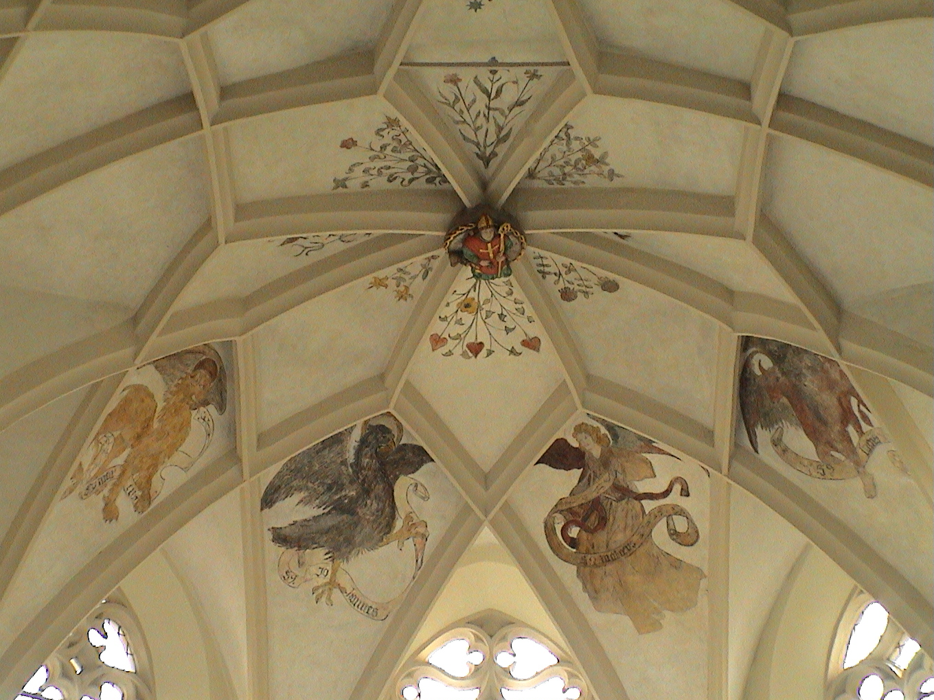 Gewoelbe im Chor 2007